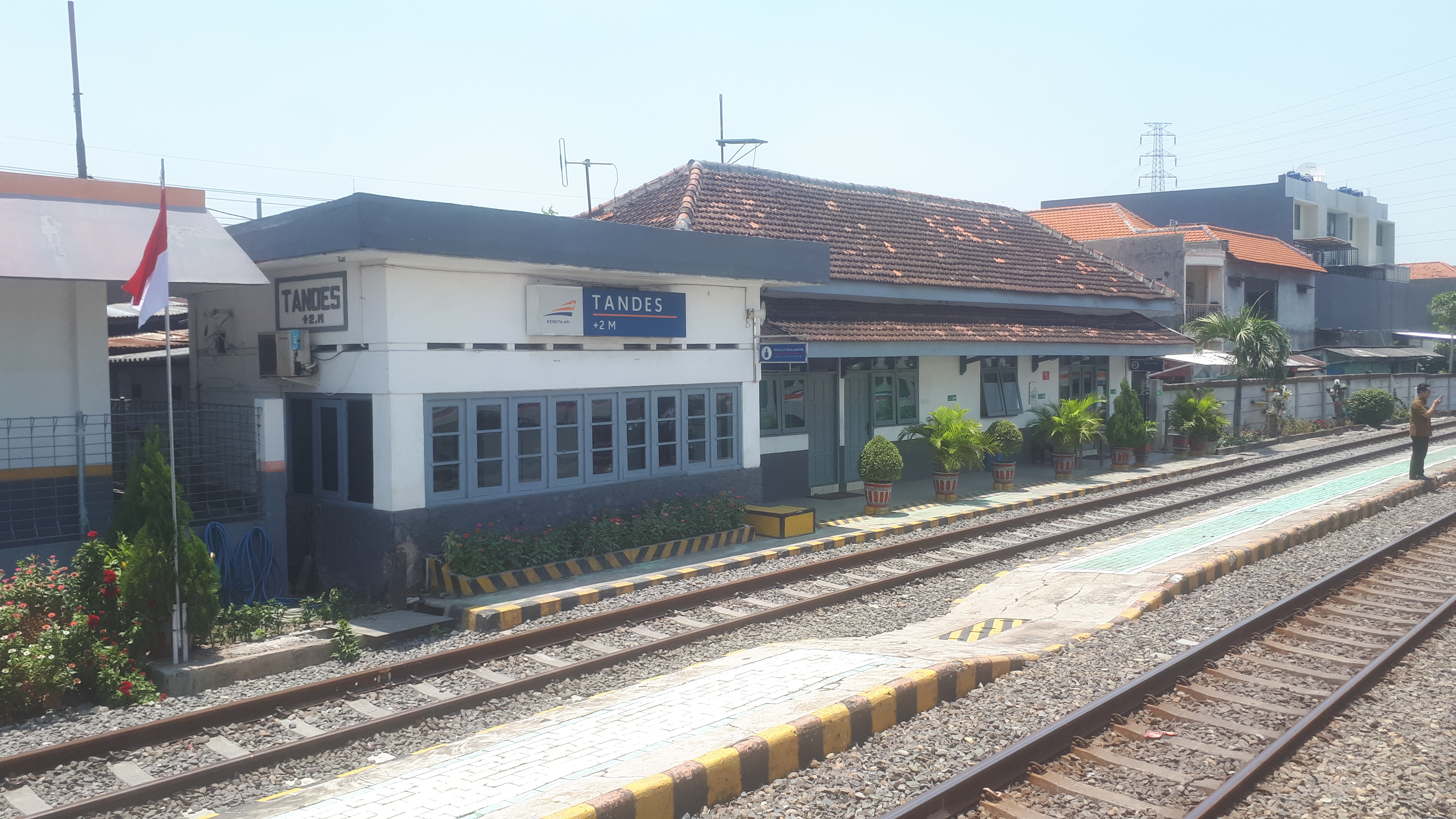 Peron Stasiun Tandes tahun 2019.